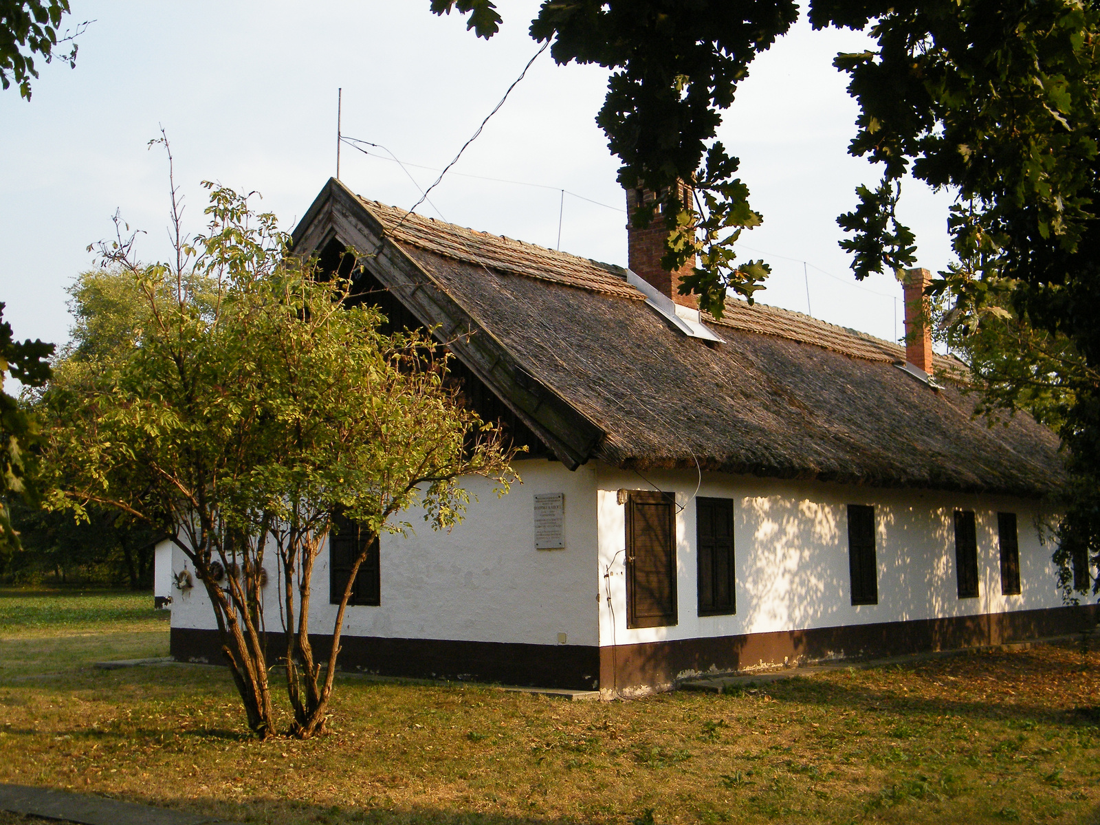 Lakóház, népi (Biharnagybajom, Petőfi utca 4.) This is a photo of a monument in Hungary, Identifier: 5205